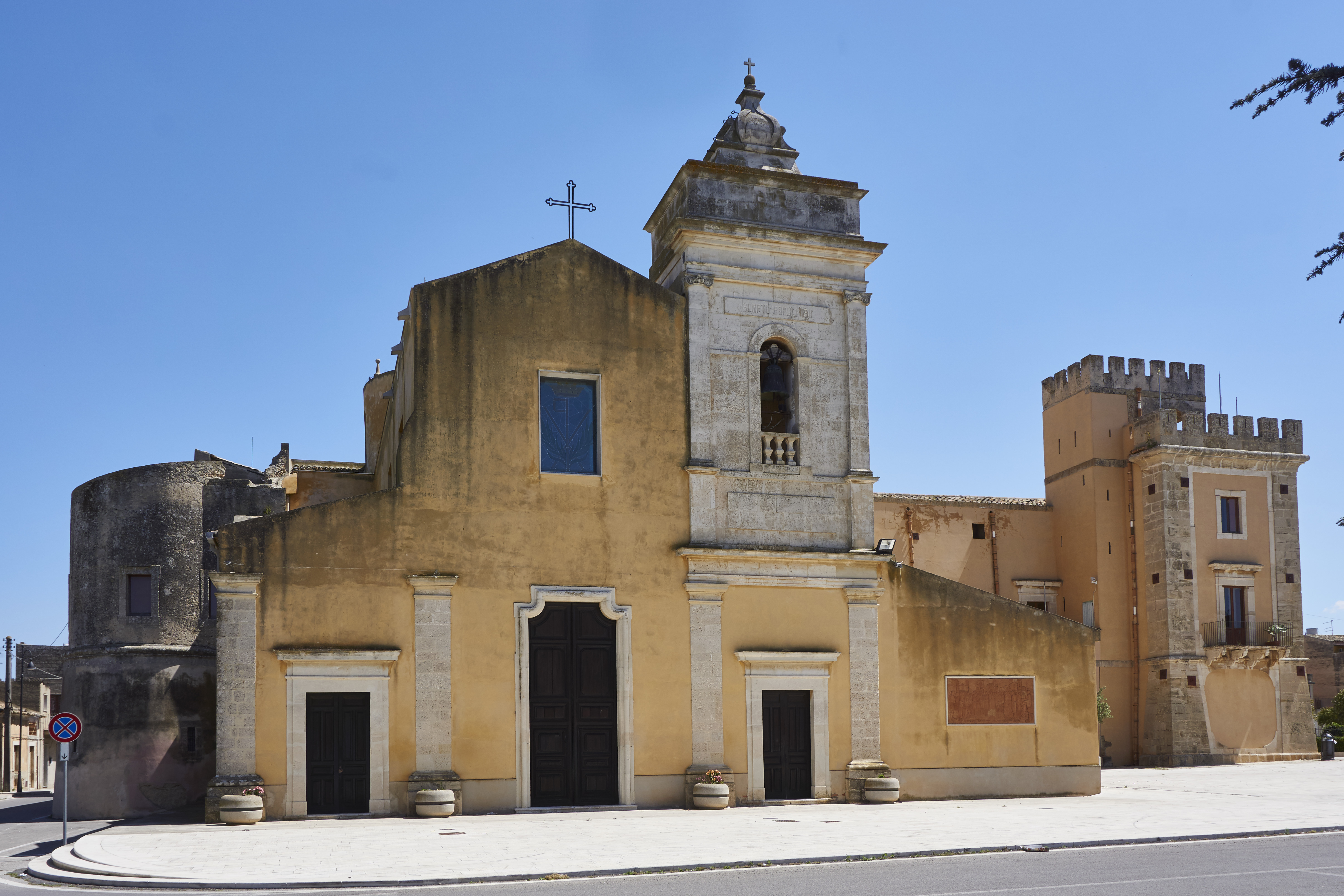 Chiesa di San Vincenzo - Acate (RG), Italia